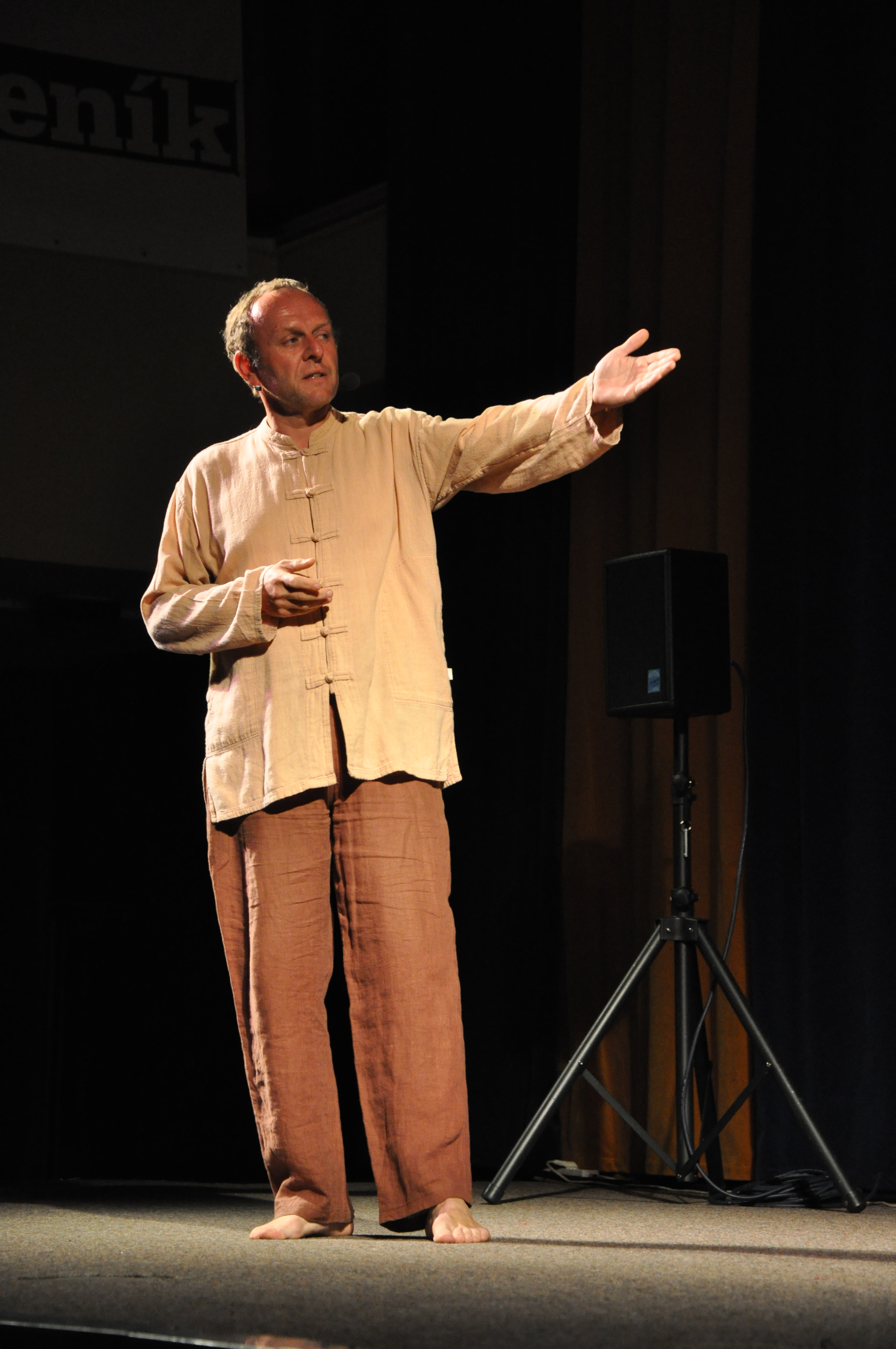 Jaroslav Dušek